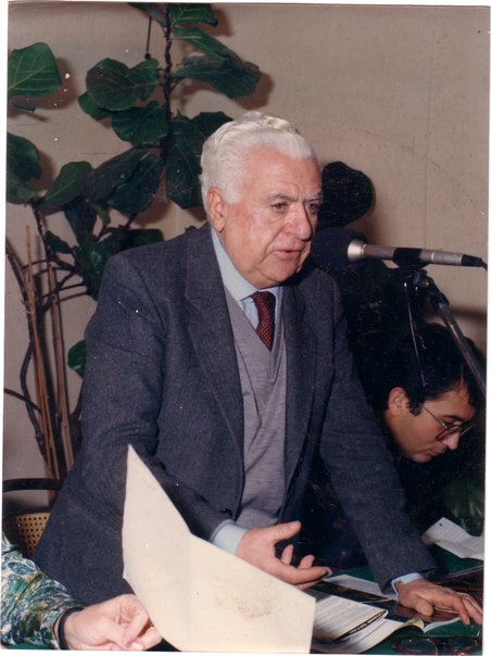 prof. Pietro Genduso